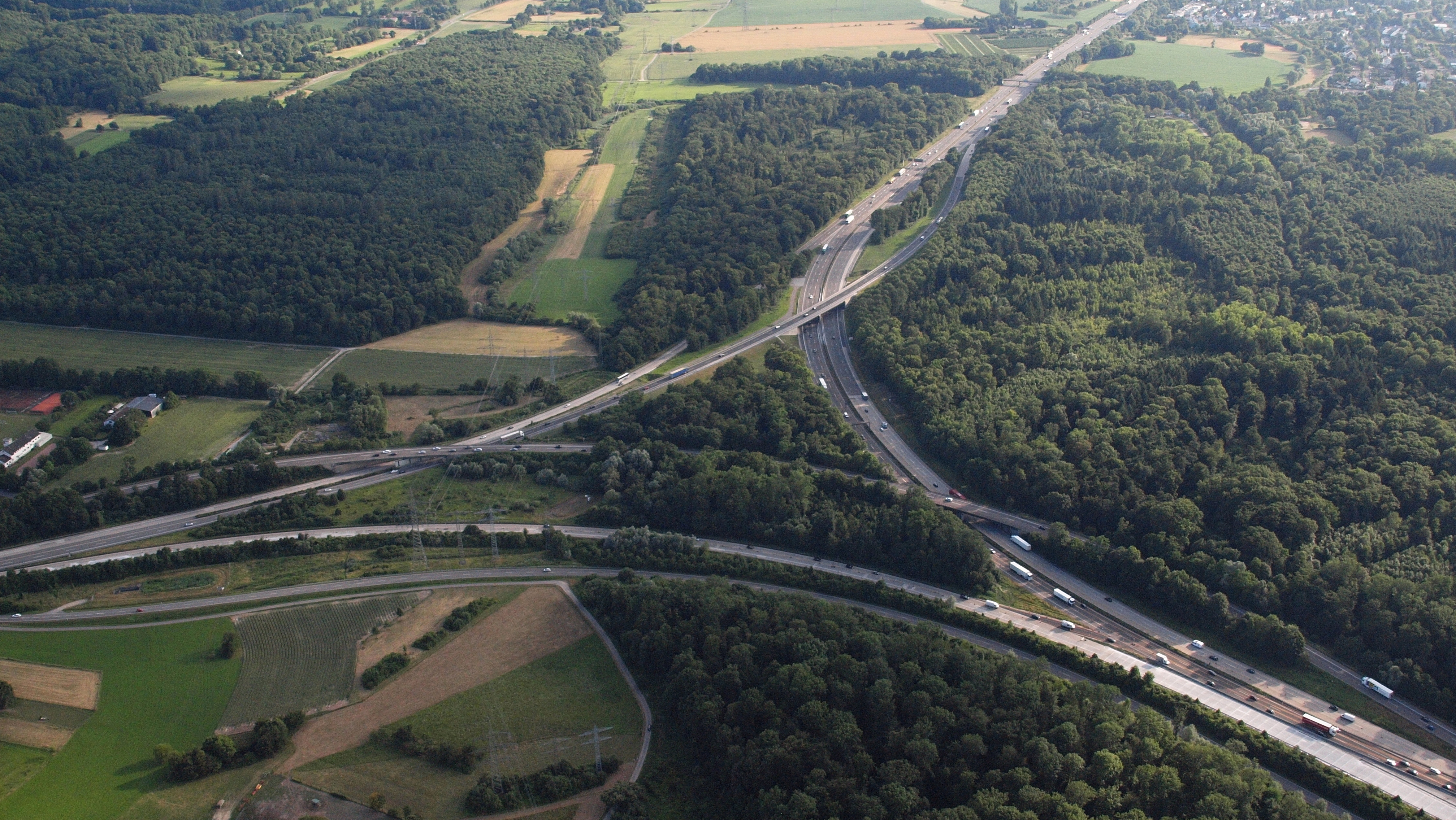 Bundesautobahn 5/Bundesautobahn 8, Autobahndreieck Karlsruhe: Luftaufnahme von Nordosten; oben (etwas links von der Mitte) der Scheidgraben am Stadtwald Ettlingen mit Trassen von vier parallelen Freileitungen